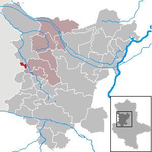 Beendorf in Saxony-Anhalt (Country) - District (Landkreis) Börde